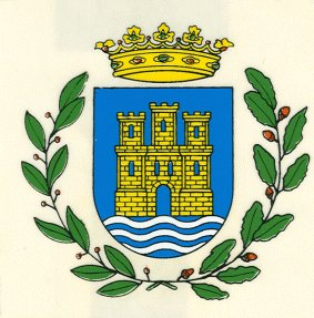 Escudo de Alcalá de Henares